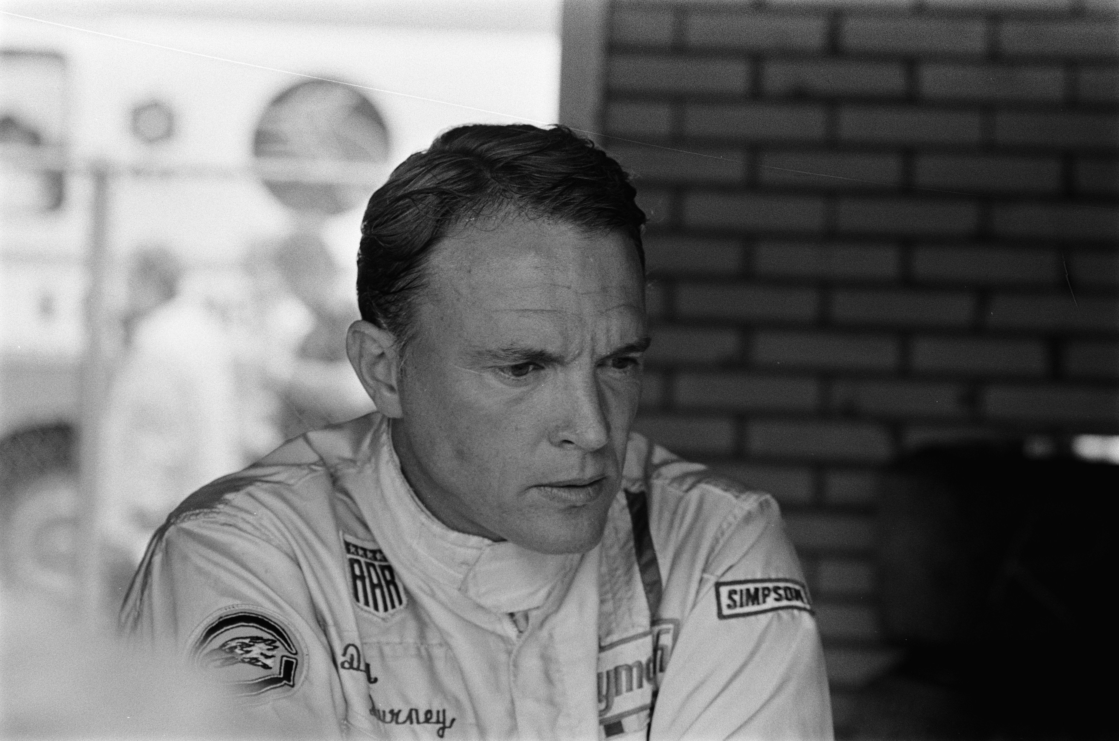 Grand Prix 1970 van Nederland voor Formule I wagens , Zandvoort; Dan Gurney , kop.